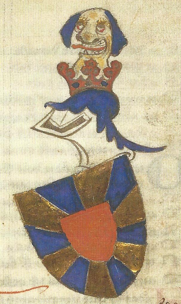 Oude wapen van Vlaanderen (voor 1100)